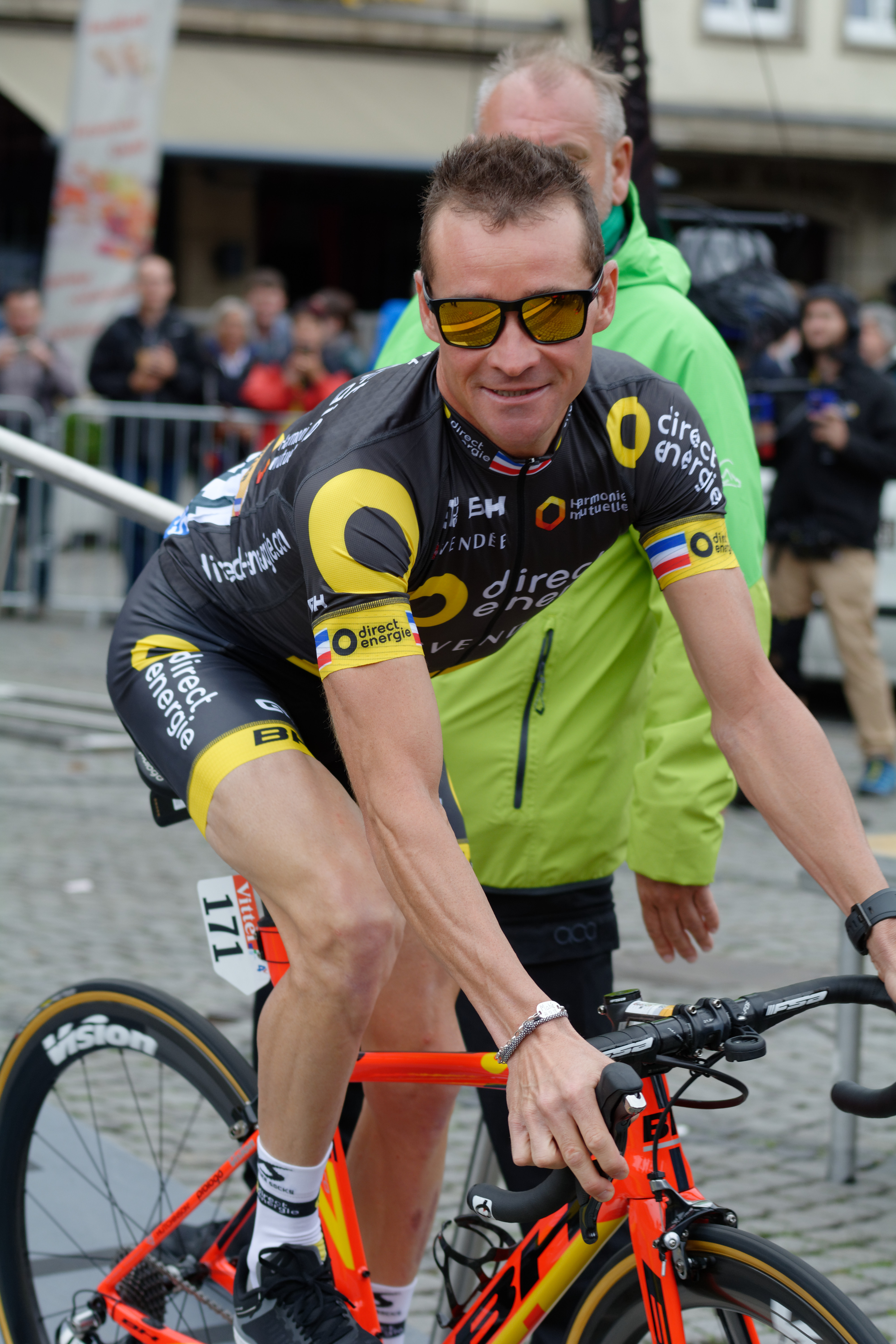 Tour de France 2017 Stage 2 Duesseldolf